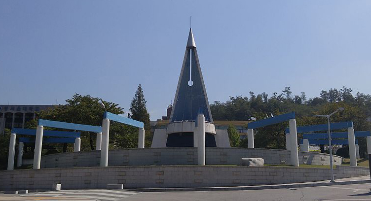 Dong-Seoul-College